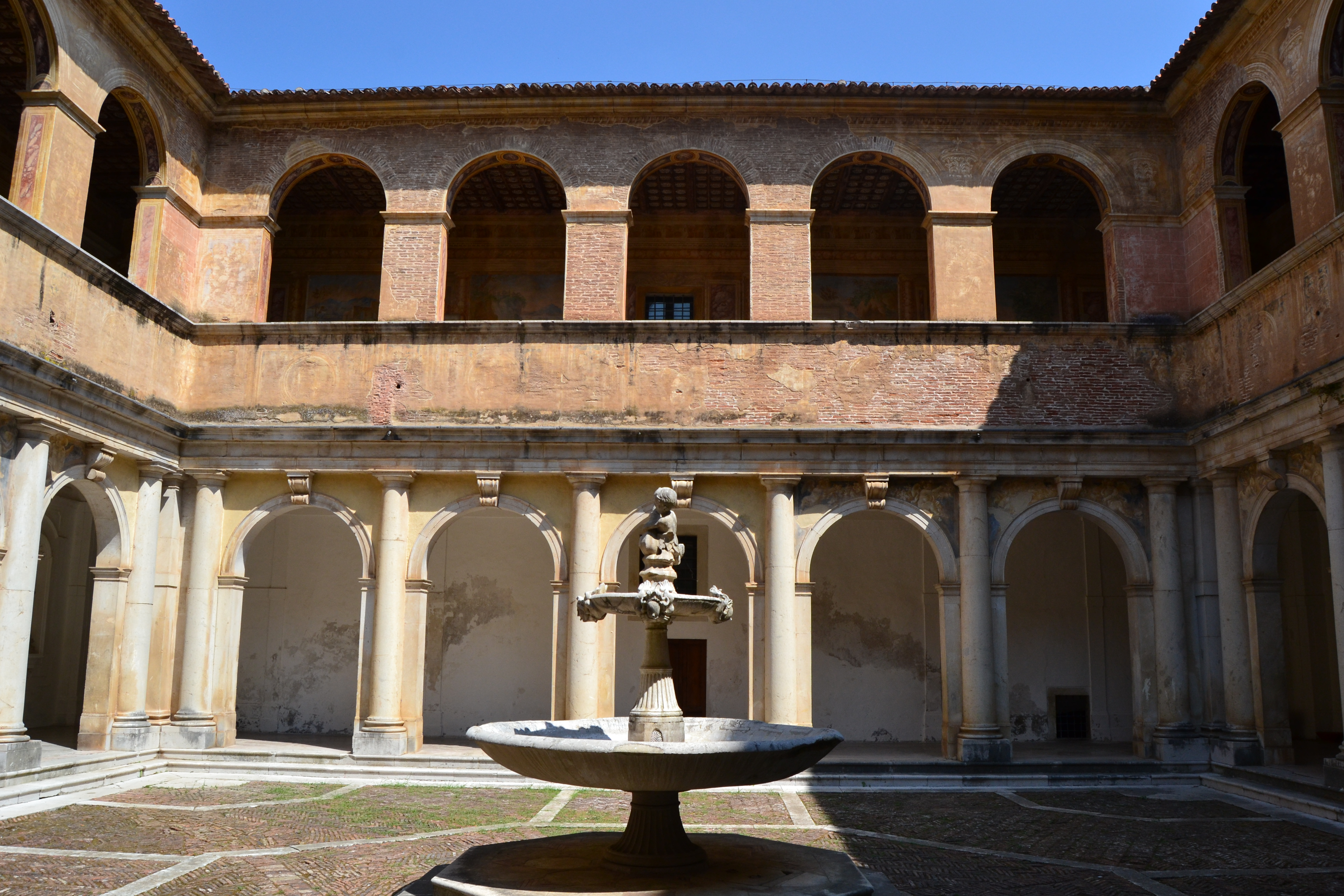 Certosa di San Lorenzo (o di Padula) - Chiostro della Foresteria